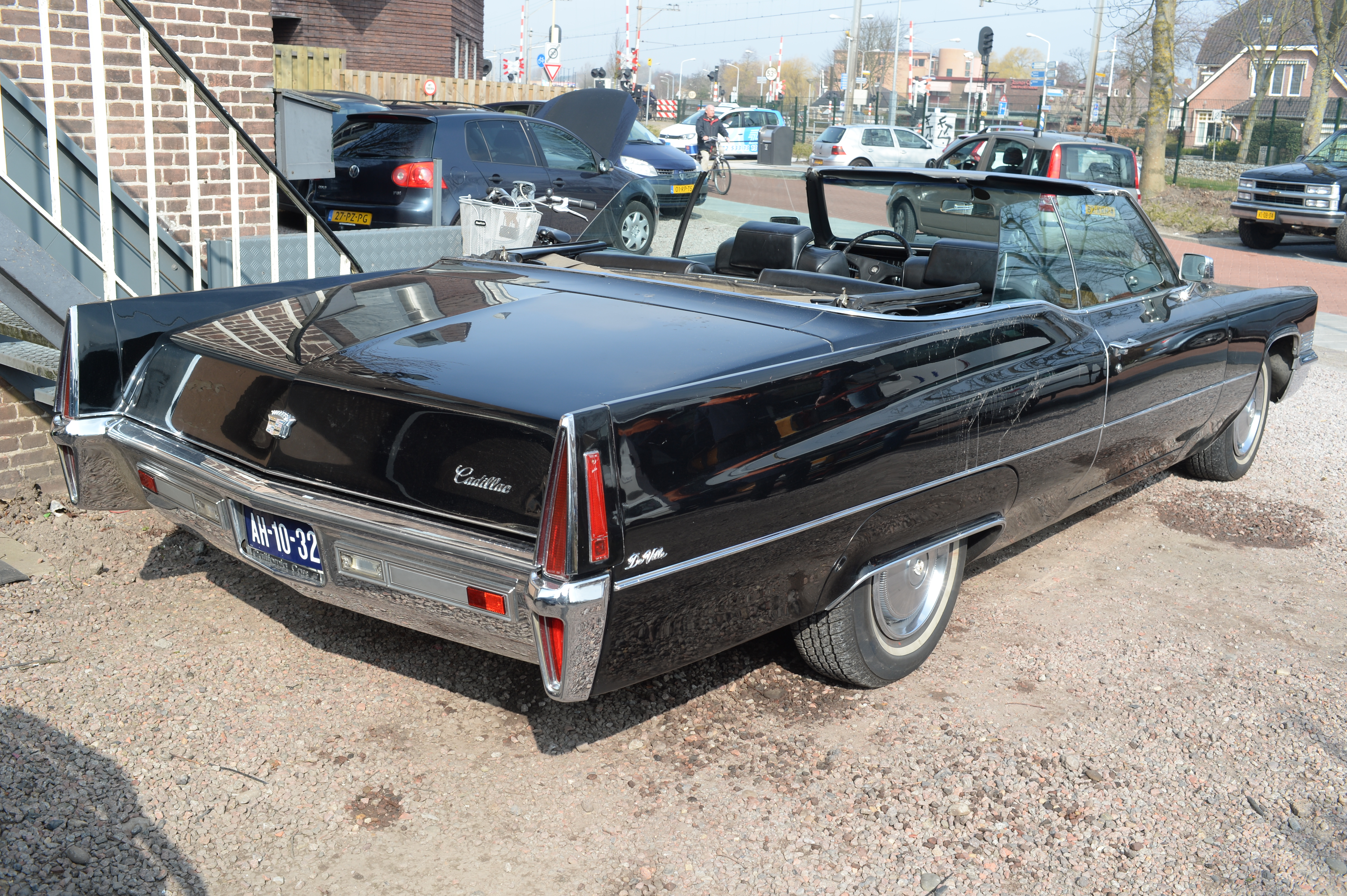 1970 Cadillac DeVille convertible